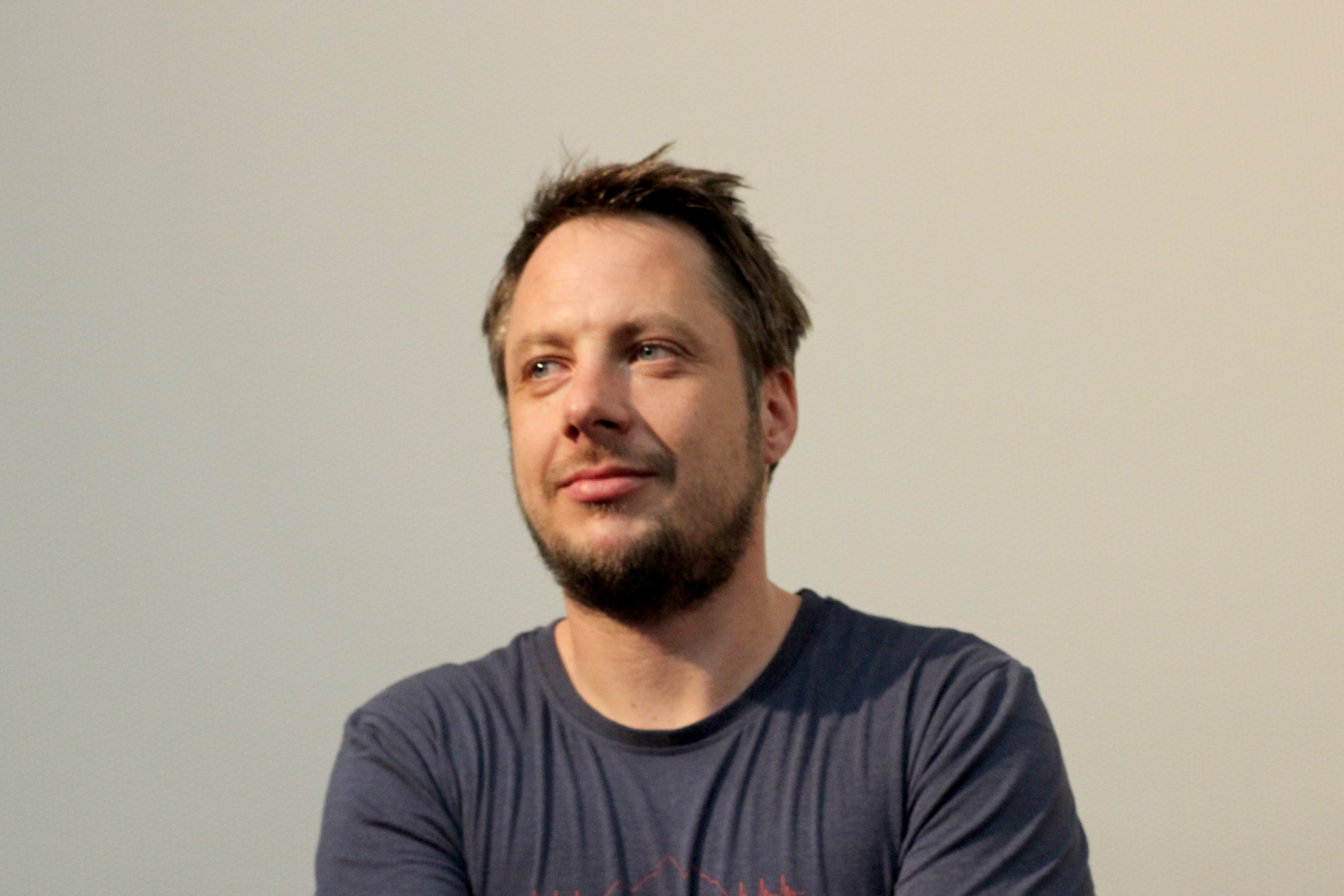 Christian Vogel, geboren 1981 in Marsberg, ist gelernter Installateur, und Journalist. Beim Hessischen Rundfunk arbeitet er seit 2010 als Reporter, Autor und Redakteur für unterschiedliche Abteilungen. Aufnahme von 2018.